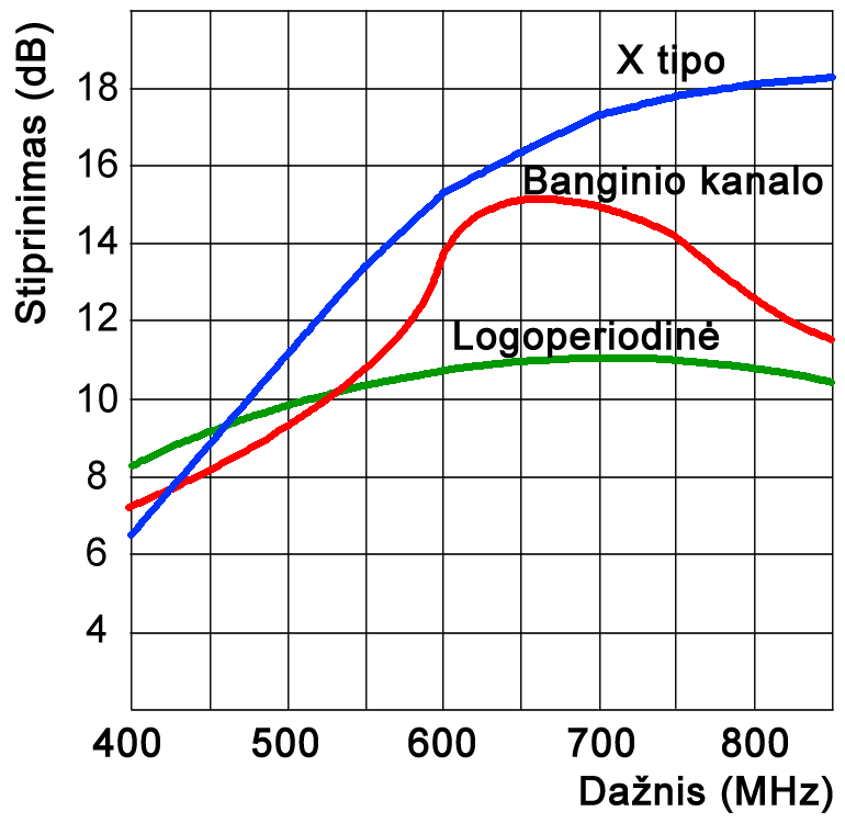 Dažniausiai naudojamų TV antenų tipinių dažninių stiprinimo charakteristikų palyginimo diagrama.